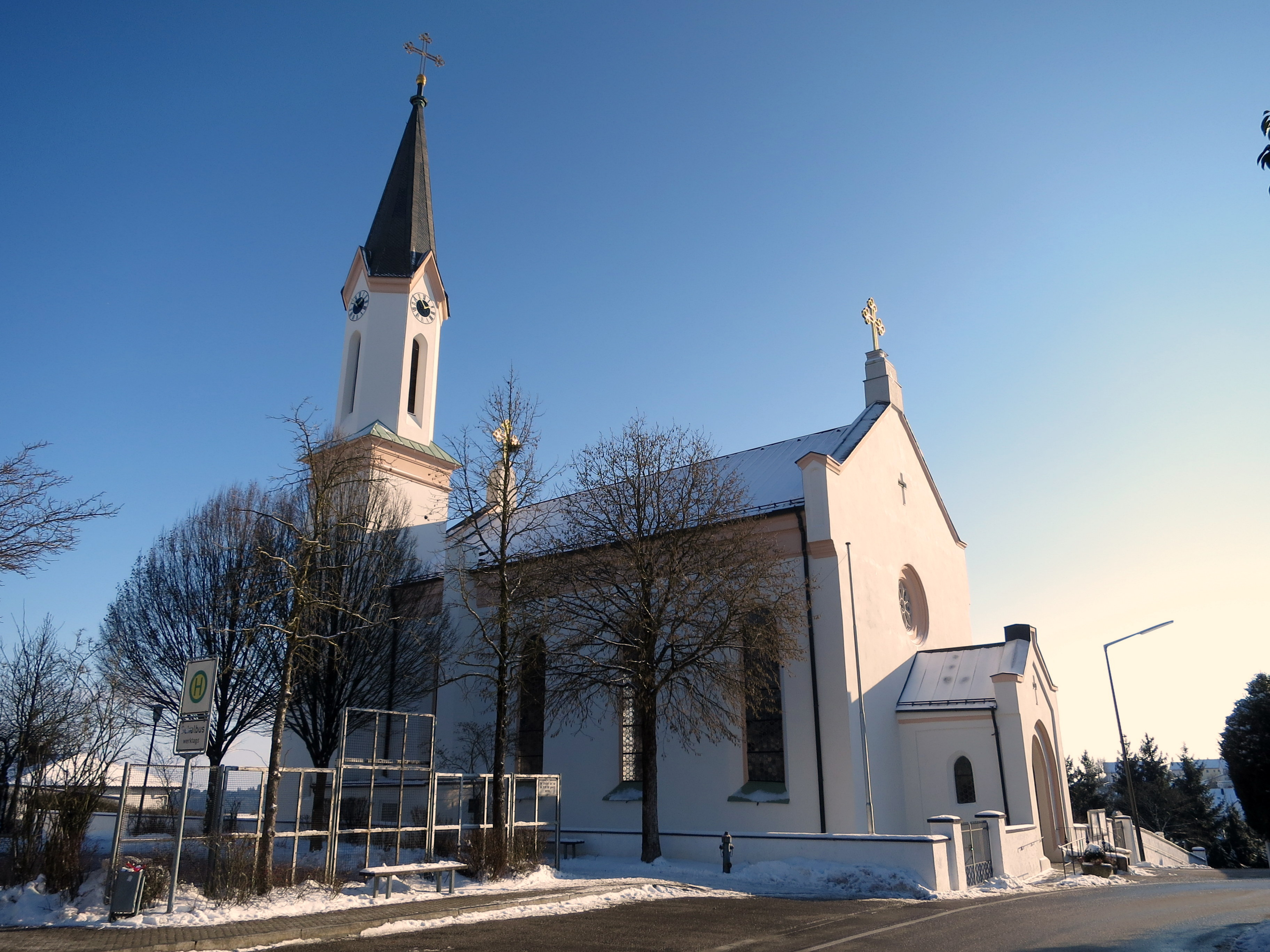 Details der Pfarrkirche von Wolfersdorf